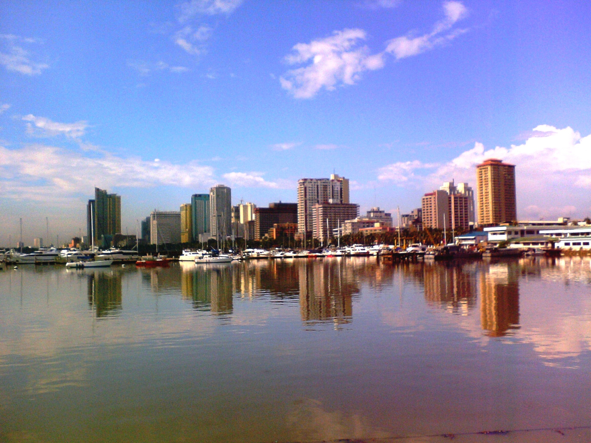 1202 Bukaneg St, Malate, Pasay, 1307 Metro Manila, Philippines